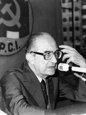 Giulio Carlo Argan nei primi anni ottanta